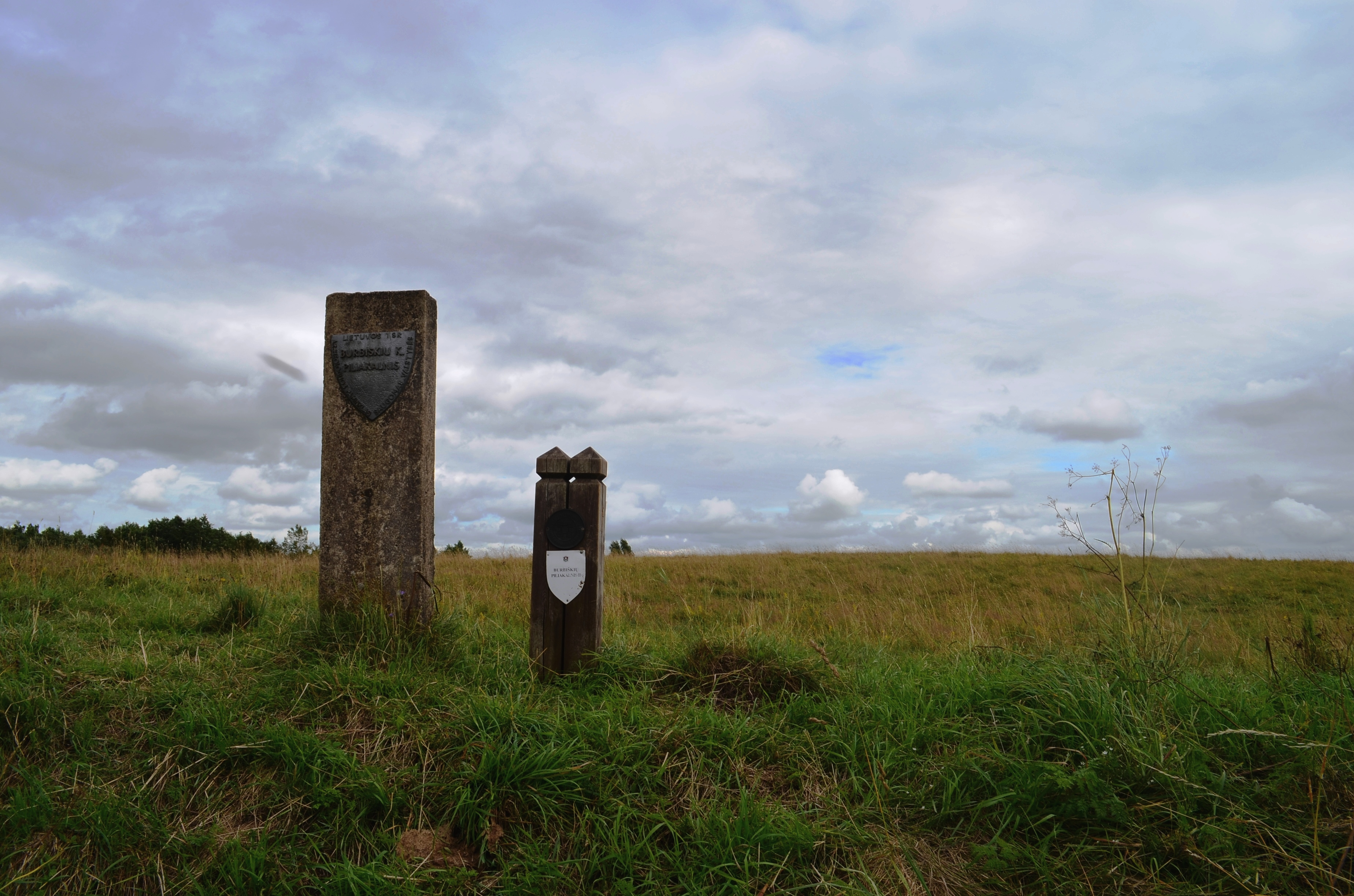 Burbiškių II piliakalnis, Šilalės raj. Žemaitėška: Borbėškiu II pėliekalnis, Šėlalės raj.